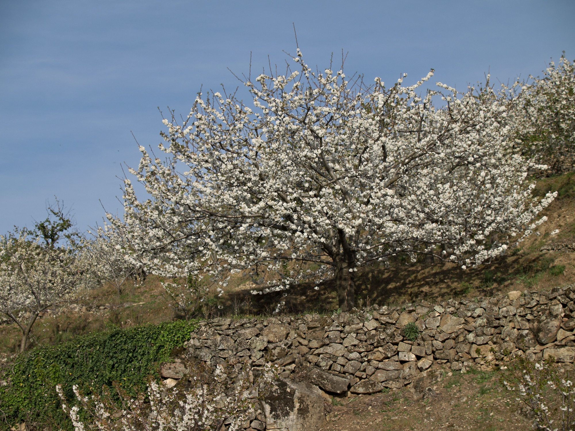 Prunus avium. Cerezos en el valle del Jerte. Jerte, Cáceres.